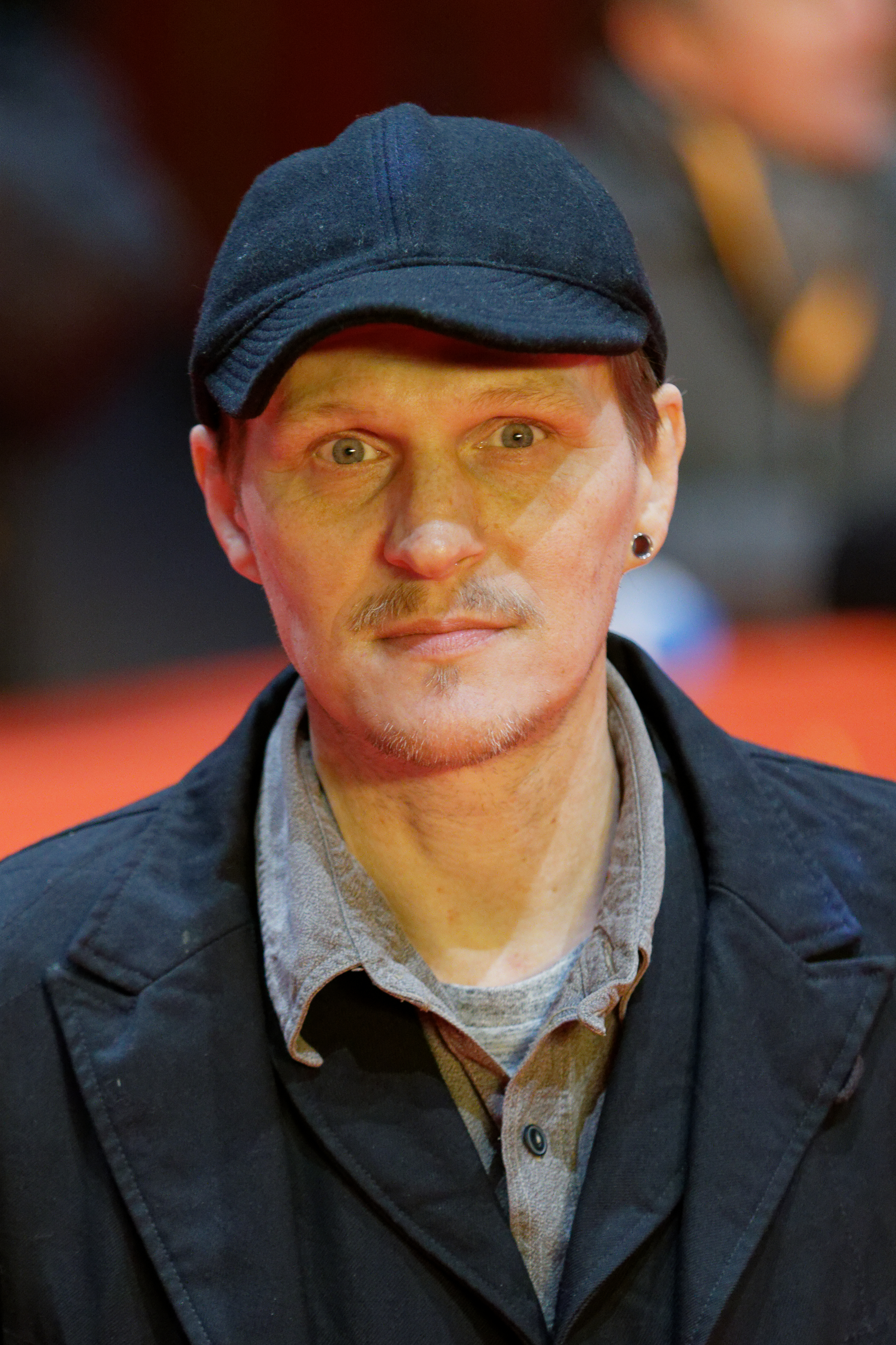 Georg Friedrich bei der Premiere von Wilde Maus bei der Berlinale 2017